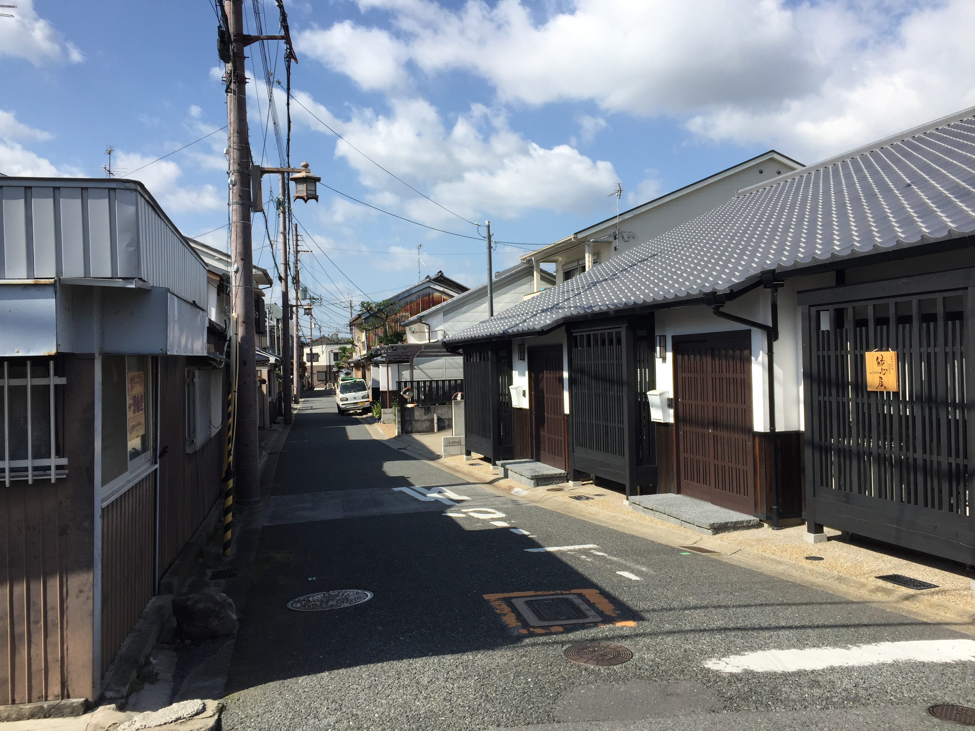 薬師堂町の街並みです